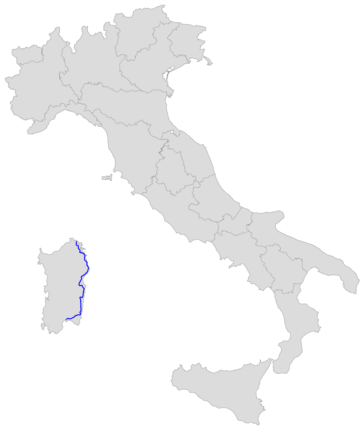 Percorso della SS 125 Orientale Sarda